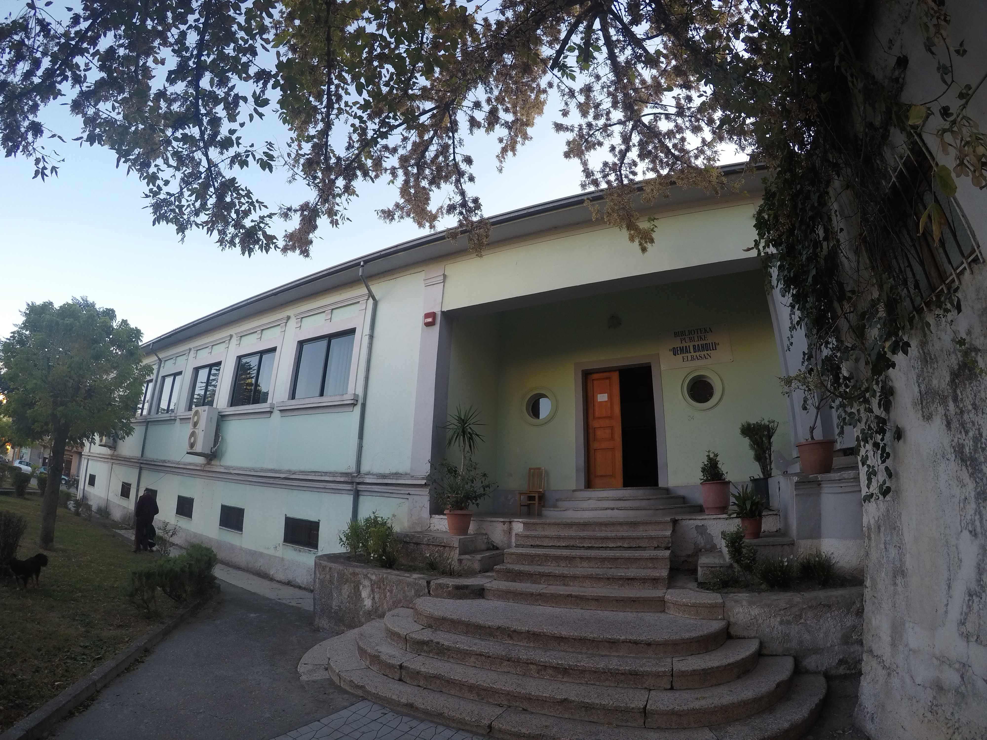 Biblioteka Publike (Elbasan)